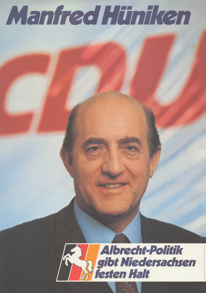 Manfred Hüniken CDU Albrecht-Politik gibt Niedersachsen festen Halt Abbildung: Porträtfoto - Nationalfarben mit Niedersachsenross Kommentar: Teilweise starke Verschmutzungen auf der Rückseite. Plakatart: Kandidaten-/Personenplakat mit Porträt Auftraggeber: Verantw.: Niedersachsen-CDU, Hannover Drucker_Druckart_Druckort: Willy F.P. Fehling GmbH, Hannover Objekt-Signatur: 10-008 : 513 Bestand: Landtagswahlplakate Niedersachsen (10-008) GliederungBestand10-18: Landtagswahlplakate Niedersachsen (10-008) » CDU Lizenz: KAS/ACDP 10-008 : 513 CC-BY-SA 3.0 DE